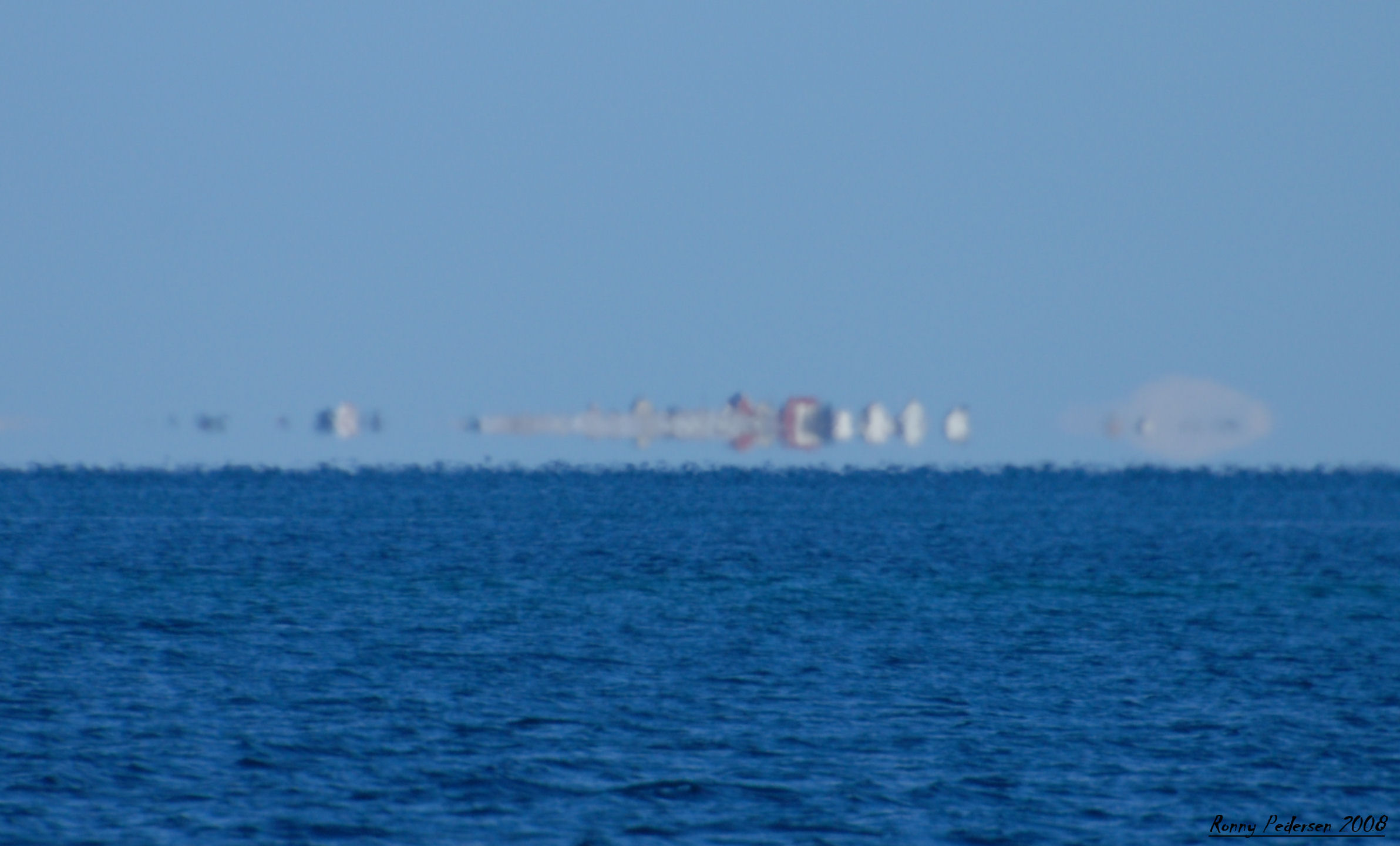 hildring